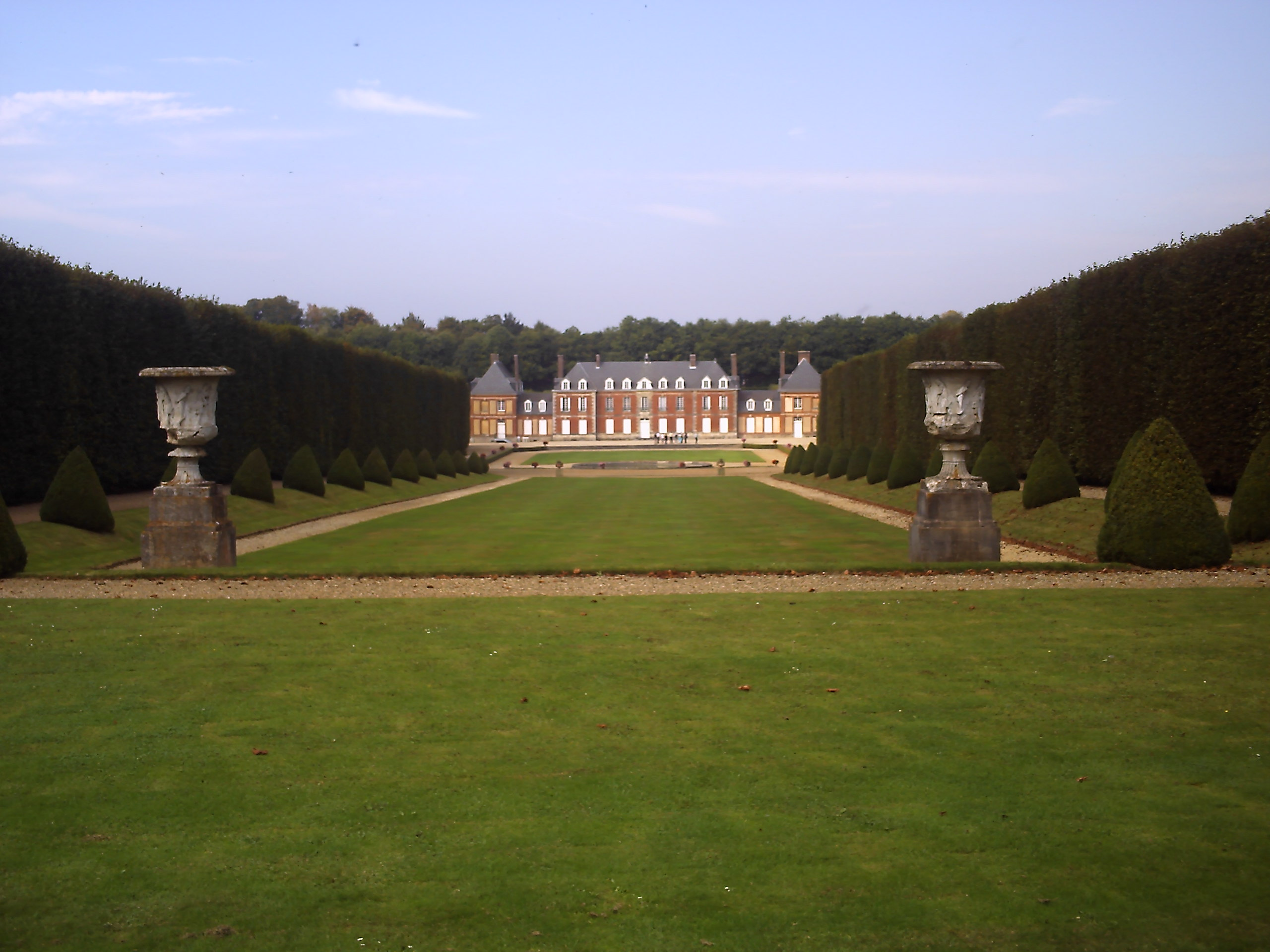 vu d'ensemble